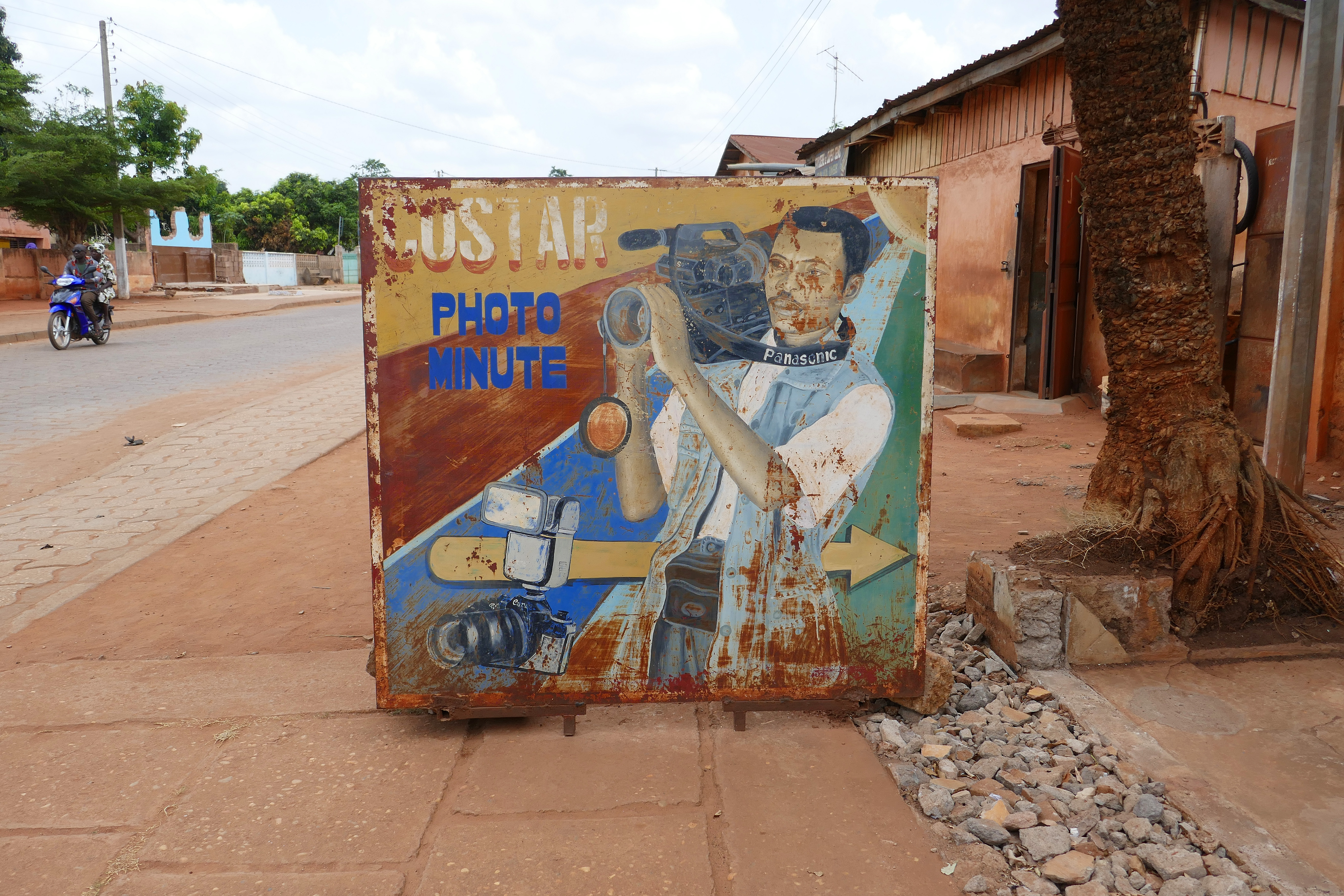 Studio de photographe à Abomey (Bénin).